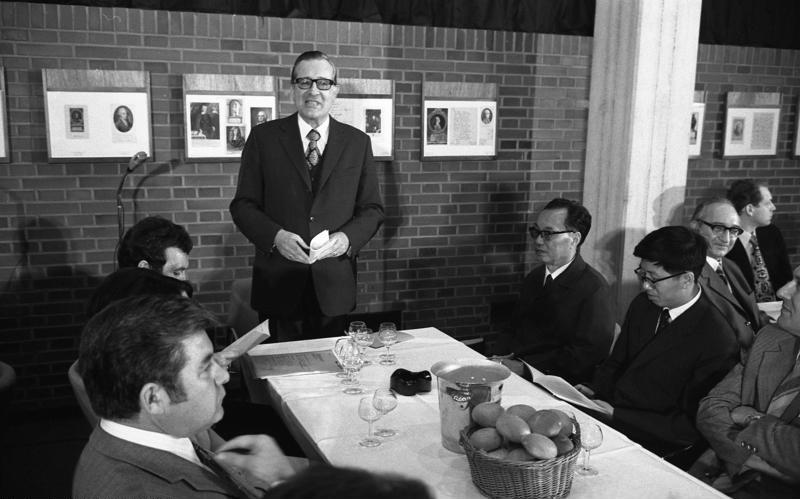 "Weinwanderung durch Baden-Württemberg" in der Landesvertretung Baden-Württemberg in Bonn, Schlegelstraße.